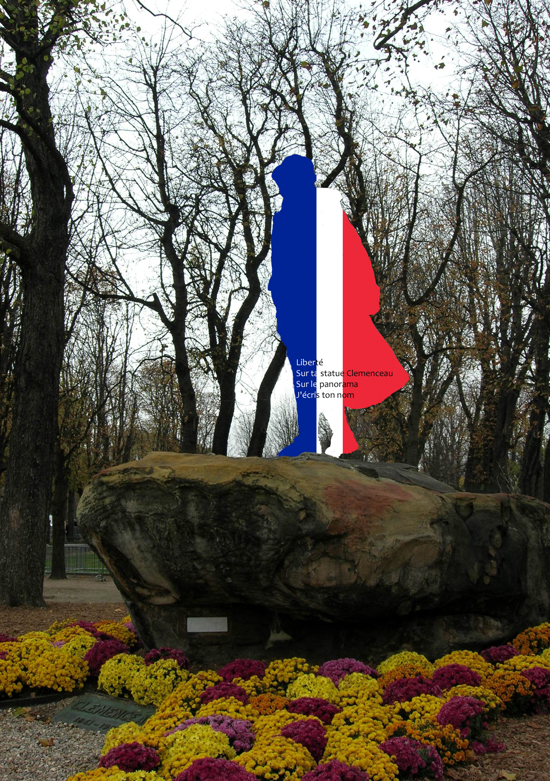 Cette photo a été censurée sur Commons car la Liberté de panorama n'existe pas en France.